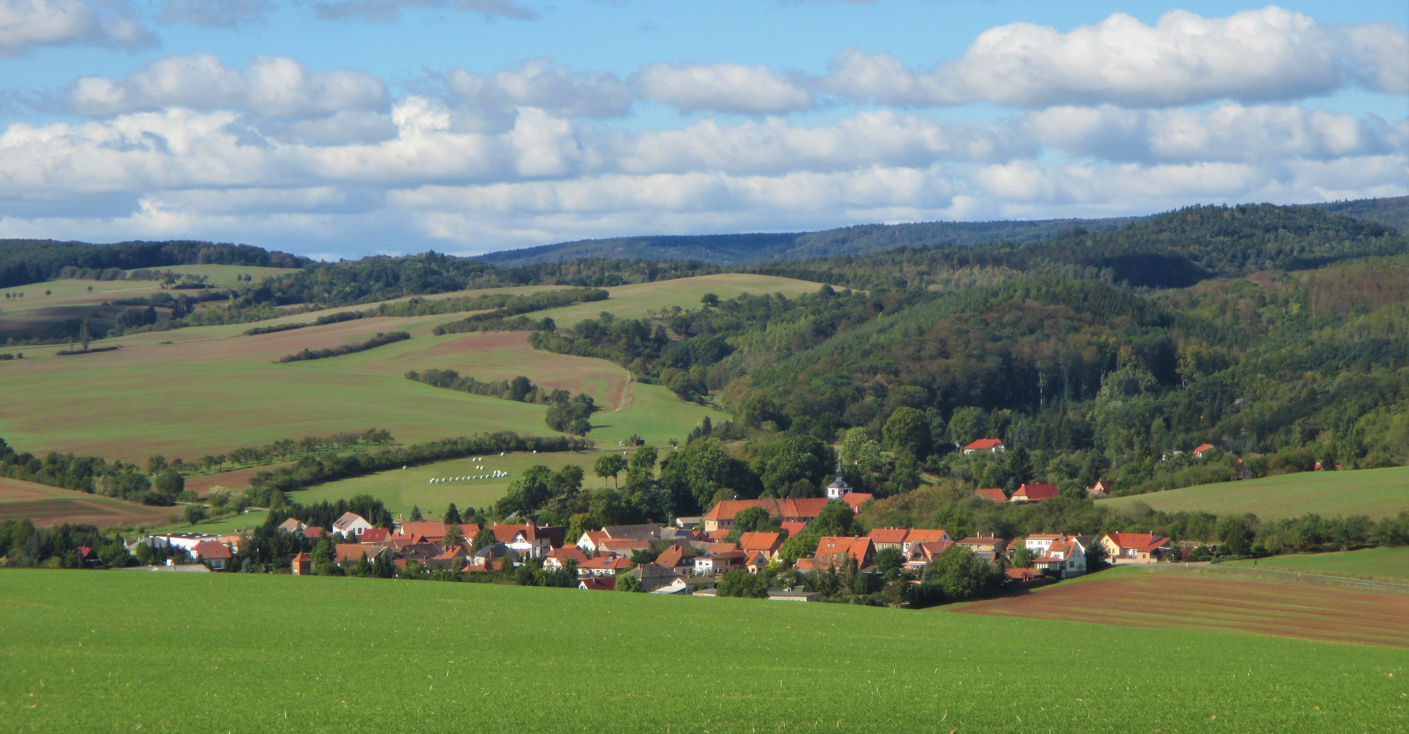 Blick von Südosten auf Großleinungen, Gemeinde Südharz, Landkreis Mansfeld-Südharz